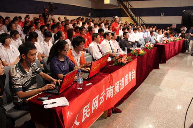 「2011中國昆明泛亞鄭和國際文化旅遊節」系列活動之一「鄭和精神與橋頭堡建設」論壇，《人民網》雲南頻道直播台。